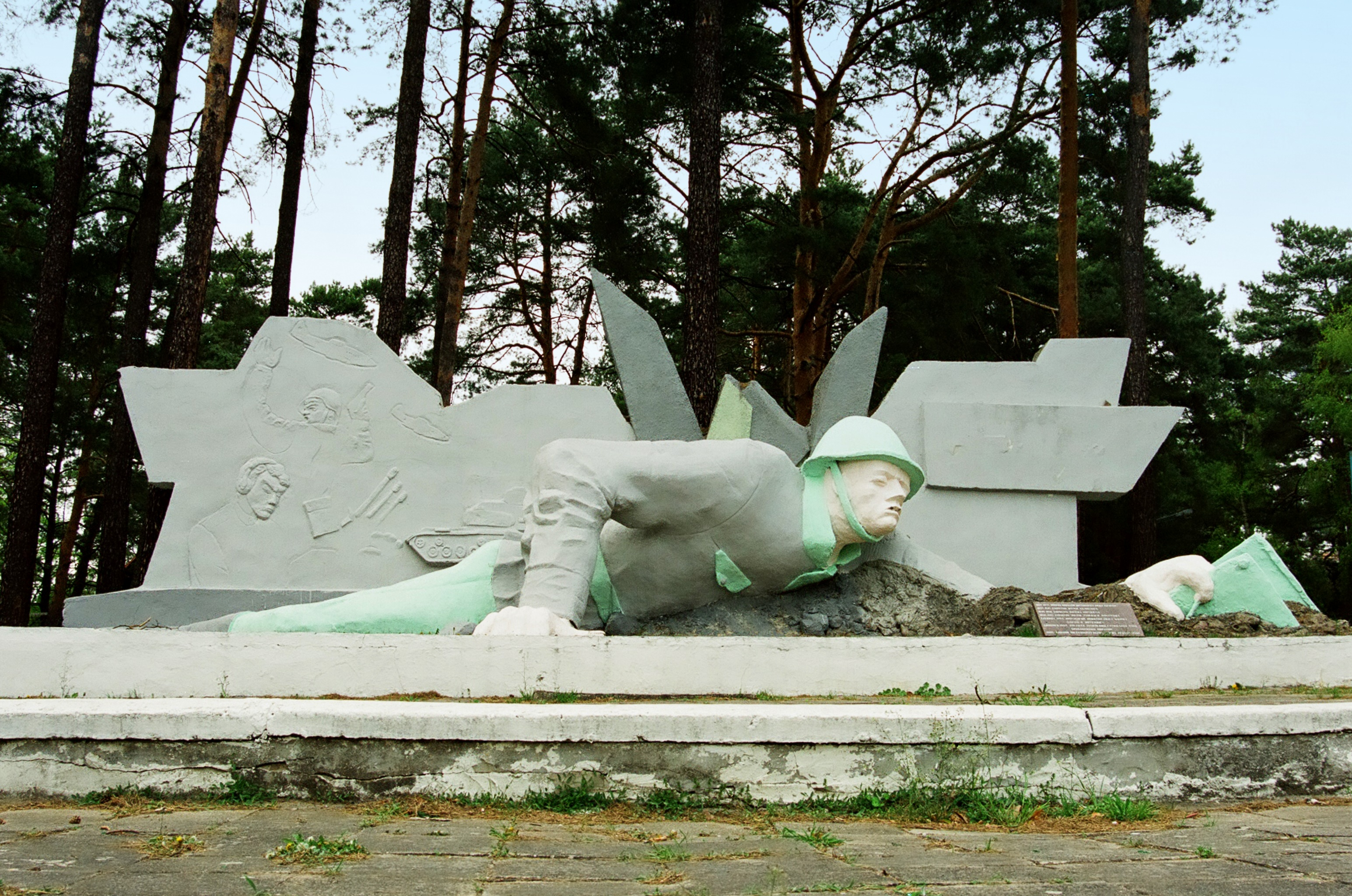 Pomnik łącznościowca na terenie byłej bazy łączności dalekosiężnej Północnej Grupy Wojsk Radzieckich w Kęszycy, woj. lubuskie ( foto z 2001 r.)